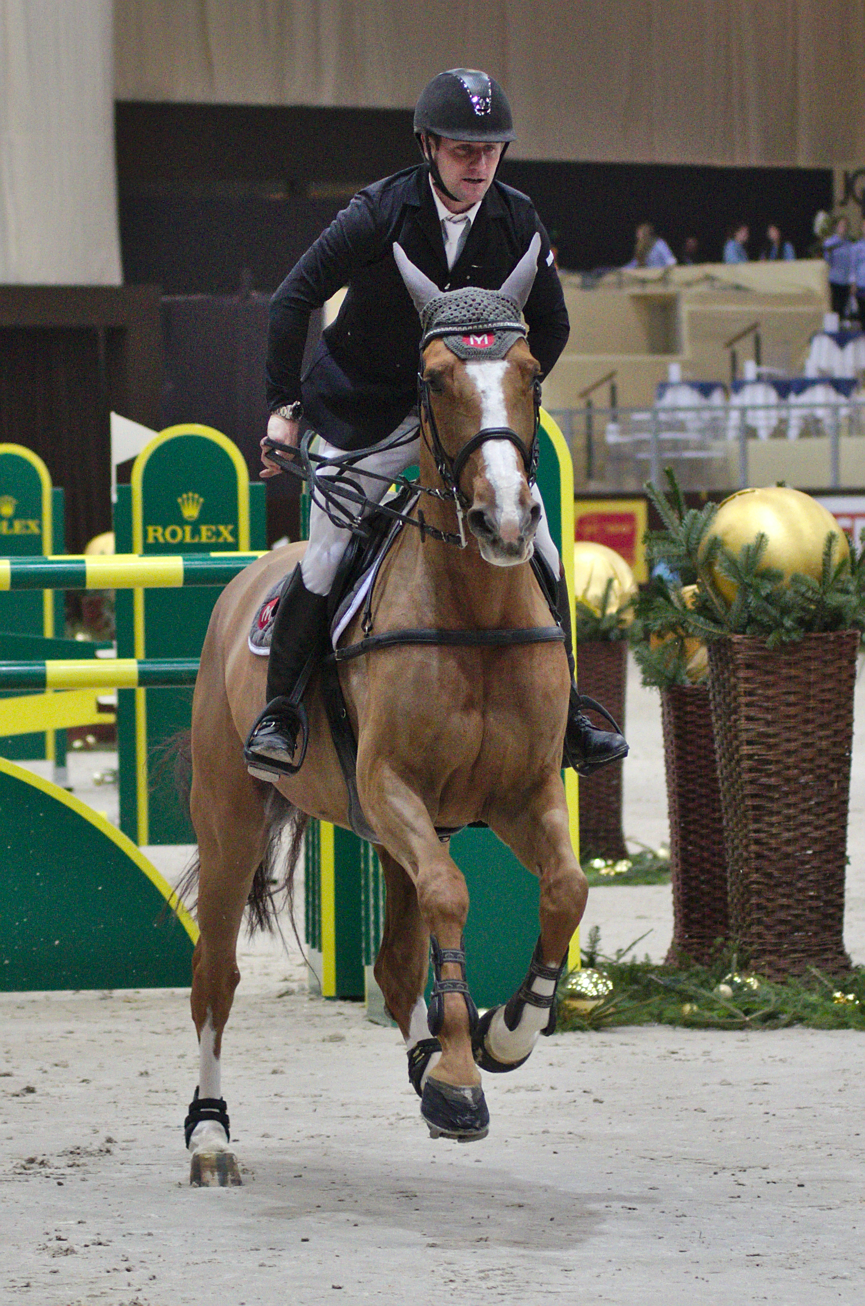 CHI Genève 2013 - 20131214 - Fabio Crotta et Rubina VIII